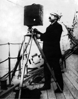 Cineasta franco-argentino Eugenio Py